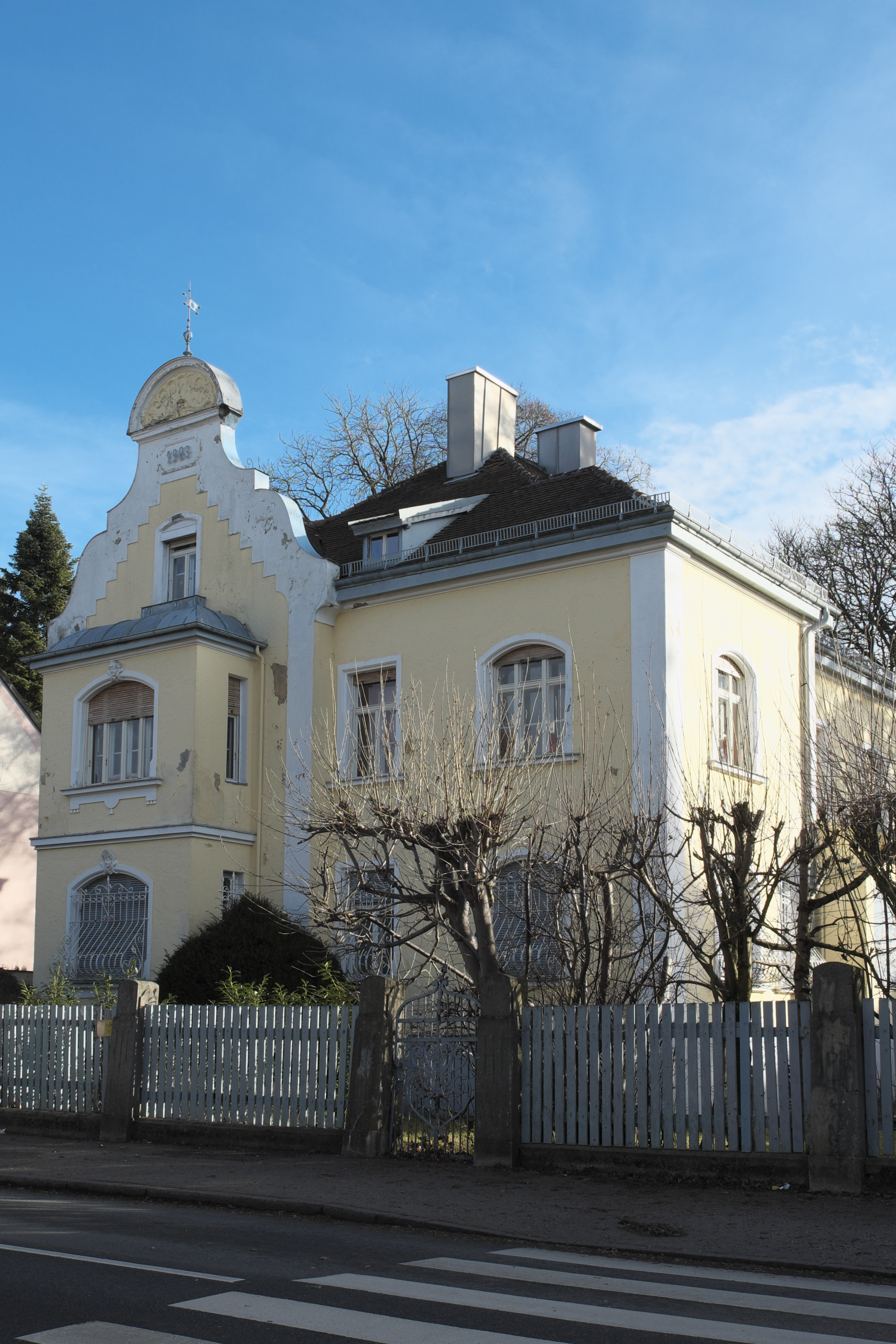 Villa in der Maria-Eich-Straße 47 in Pasing im Stadtbezirk Pasing-Obermenzing in München (Bayern/Deutschland)